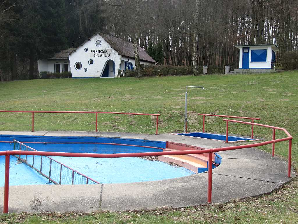 Freibad Ehlscheid (Verbandsgemeinde Rengsdorf, Rheinland-Pfalz)